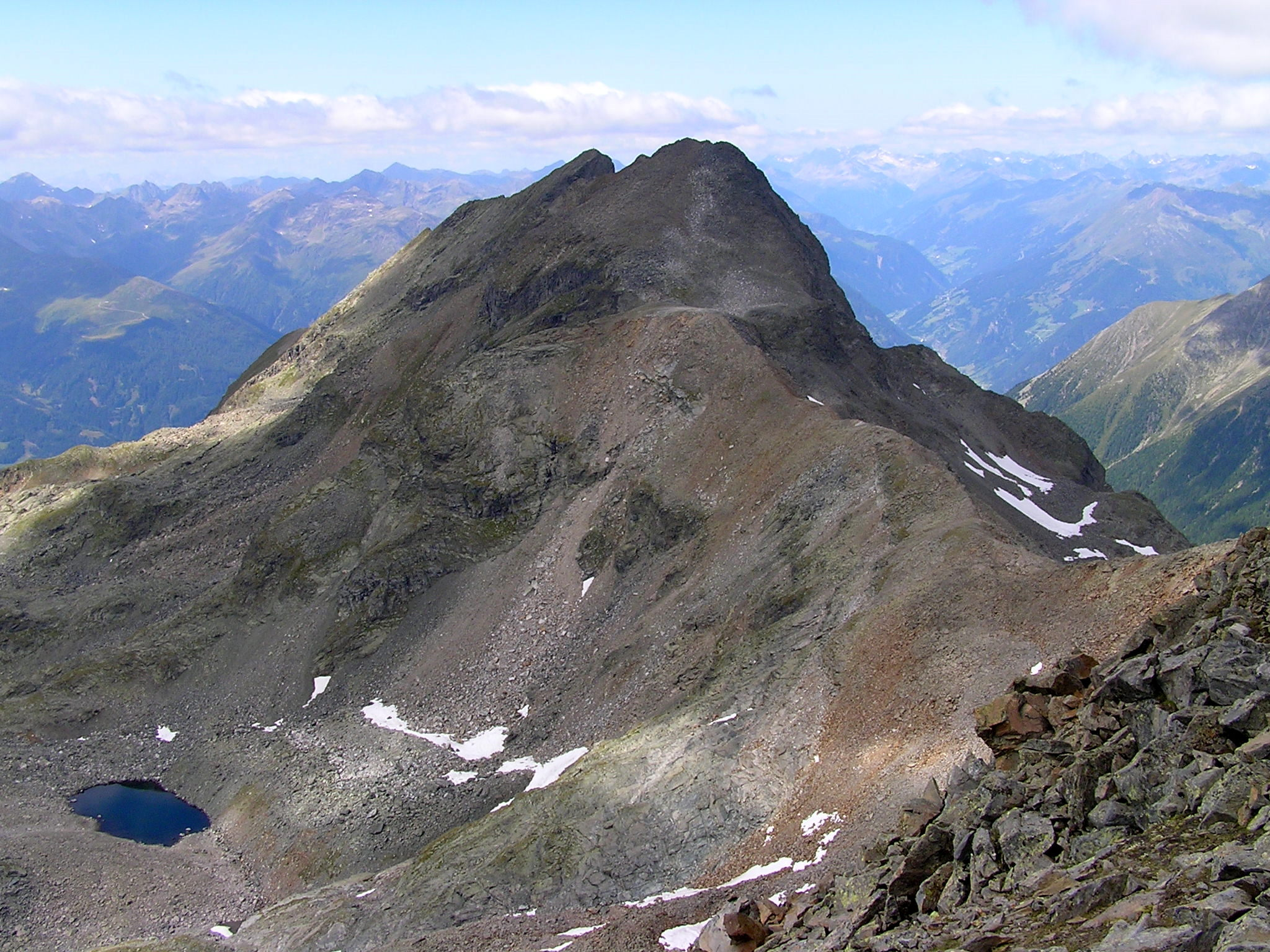 Der Prijakt von Osten, von der Alkuser Rotspitze aus gesehen